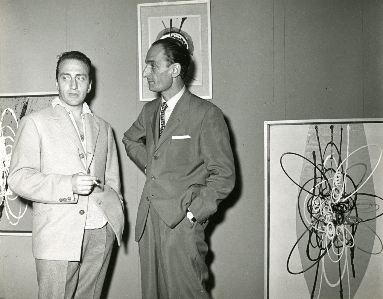 Servizio fotografico : Italia, 1975 / Paolo Monti. - Stampe: 2 : Positivo b/n, gelatina bromuro d'argento/ carta, 18x24, 24x30. - ((Al verso delle stampe manoscritto: "Crippa". Sul coperchio della scatola manoscritto: "Ritratti".